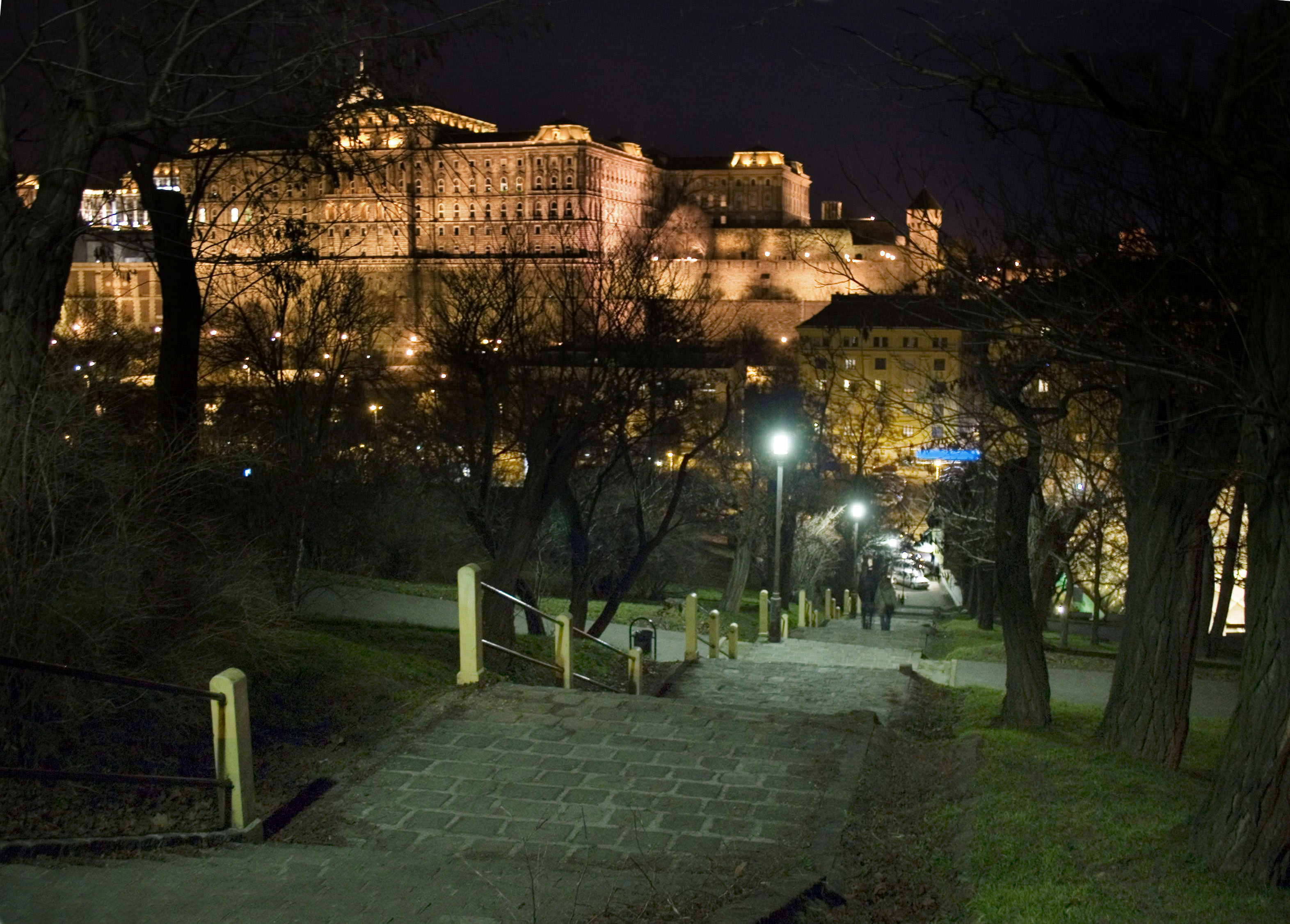 A Várnegyed esti képe a Naphegyről, a mai Tabánból, Budapest